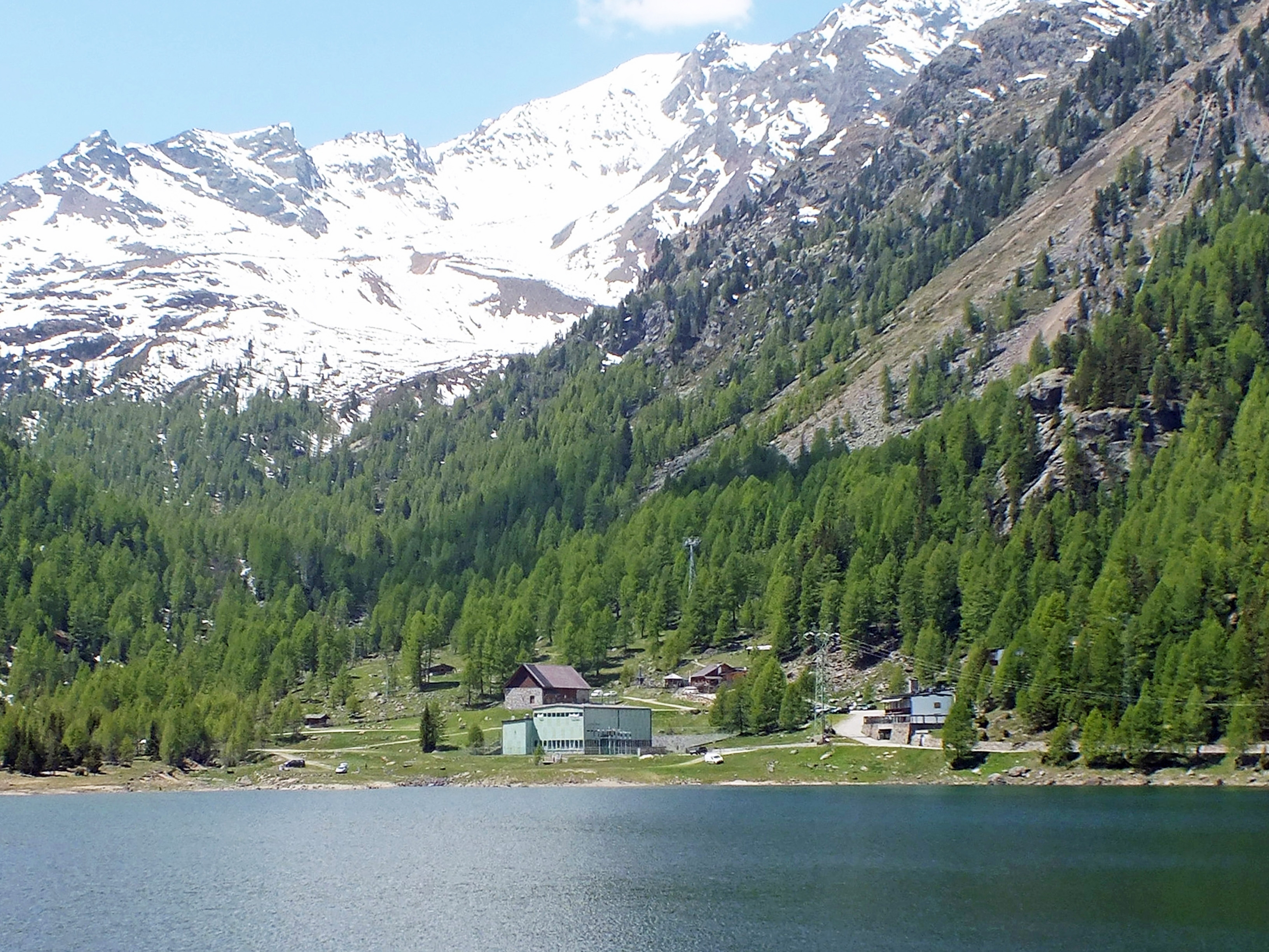 Das Ultentaler Wasserkraftwerk Weißbrunn an der Südwestseite des Weißbrunnsees gegenüber der Staumauer. Das Kraftwerk erhält sein Wasser aus dem Grünsee über eine Druckleitung (im Bild oben rechts)